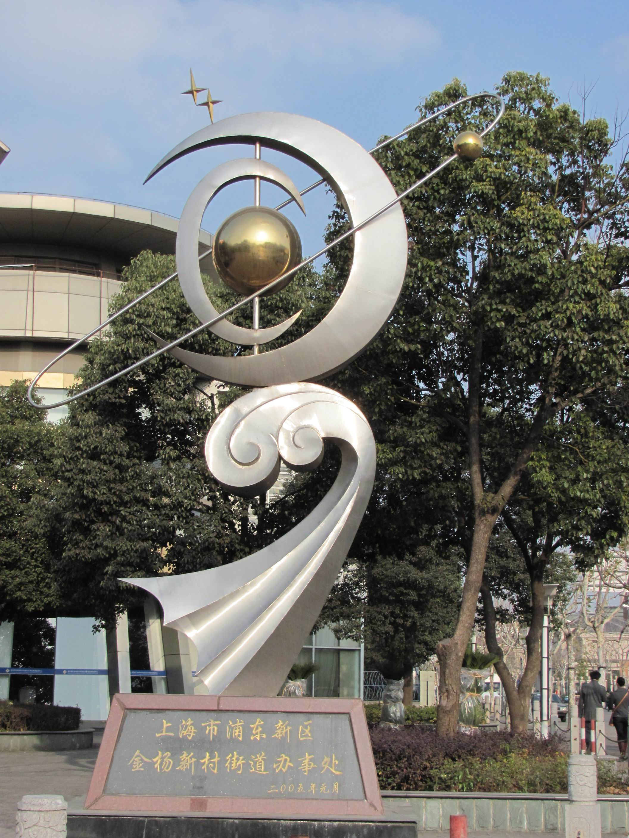 金杨街道办事处